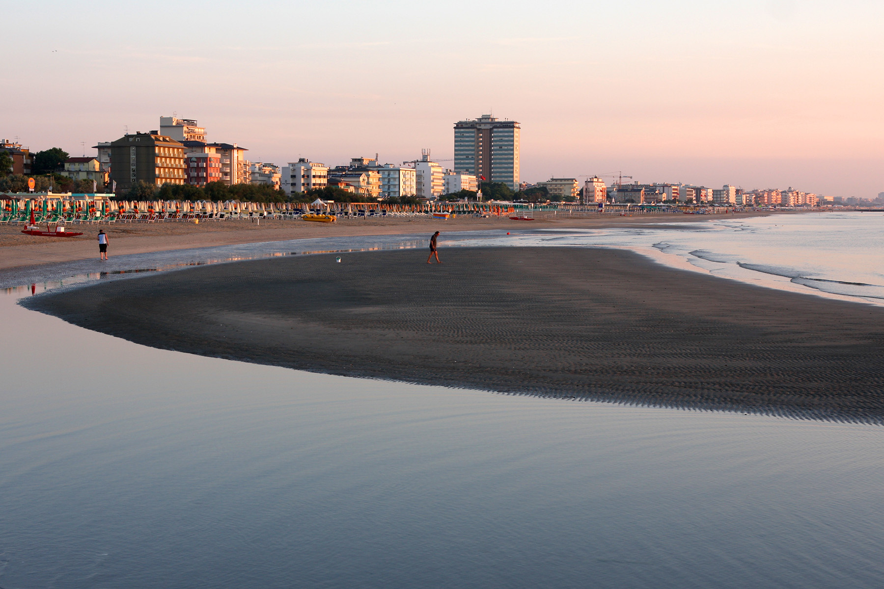 Cervia (RA)